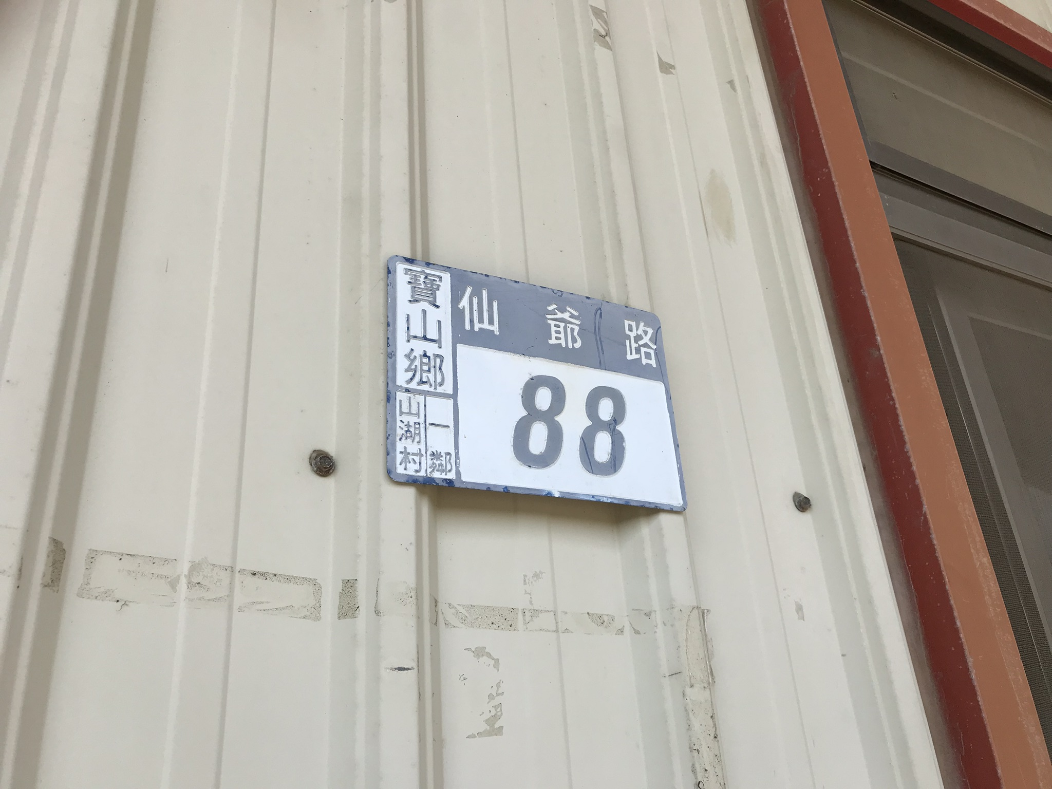 中文（台灣）: 大壢老仙爺廟門牌